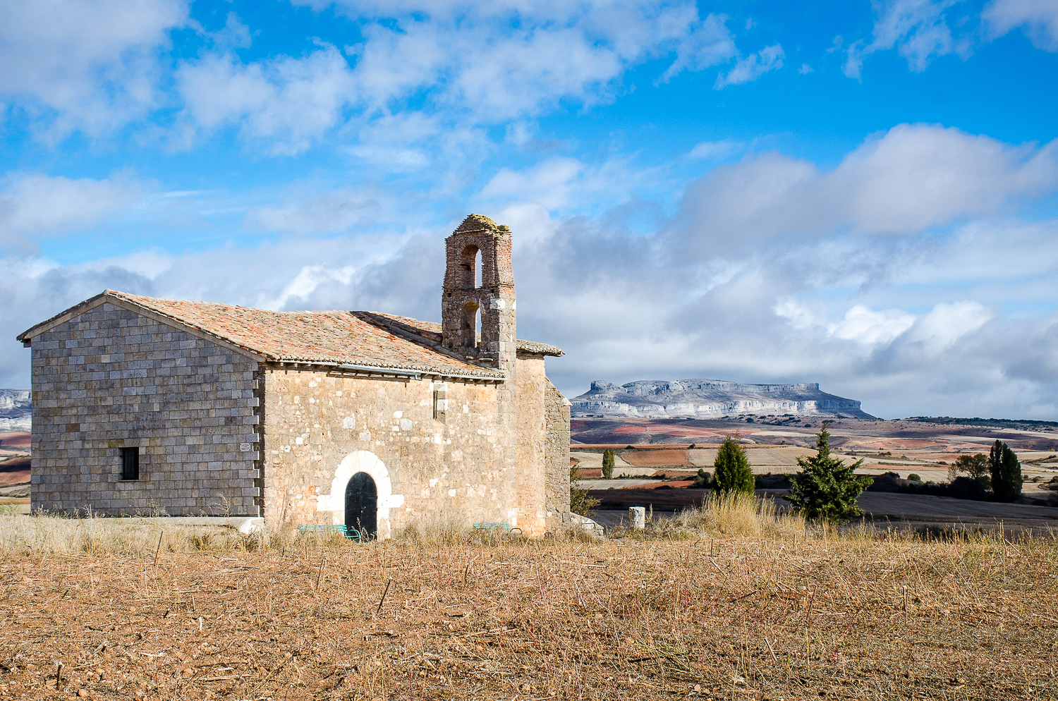 Ermita de Santa Lucía de Cañizar de Amaya (Burgos - España)